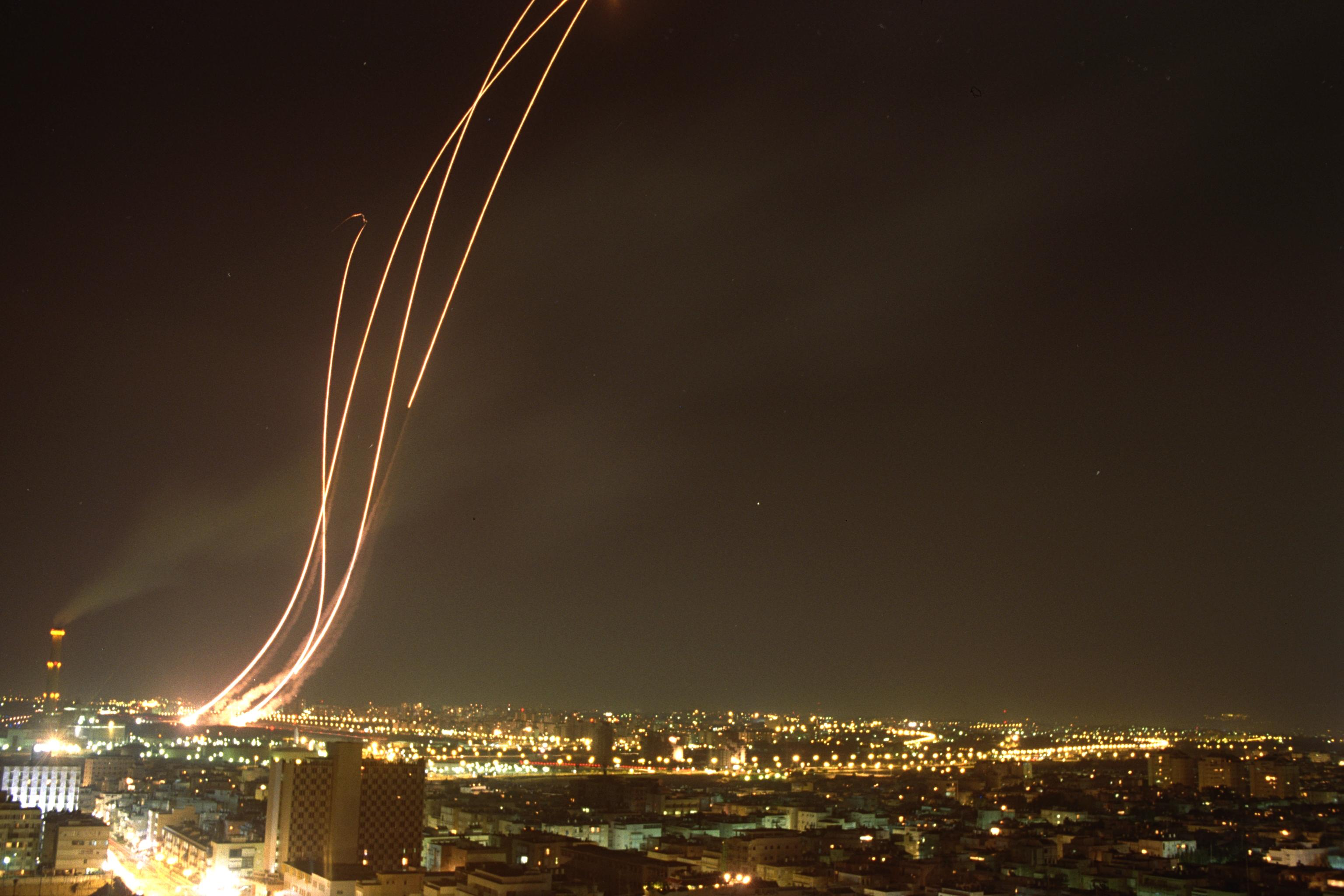 Patriot missiles being launched to intercept an Iraqi Scud missile over the city of Tel Aviv. מלחמת המפרץ. בצילום, שיגור טילי פטריוט במטרה ליירט טילי סקאד, ששוגרו מעיראק, מעל שמי תל אביב. Photo: ALPERT NATHAN, GPO.12/02/1991